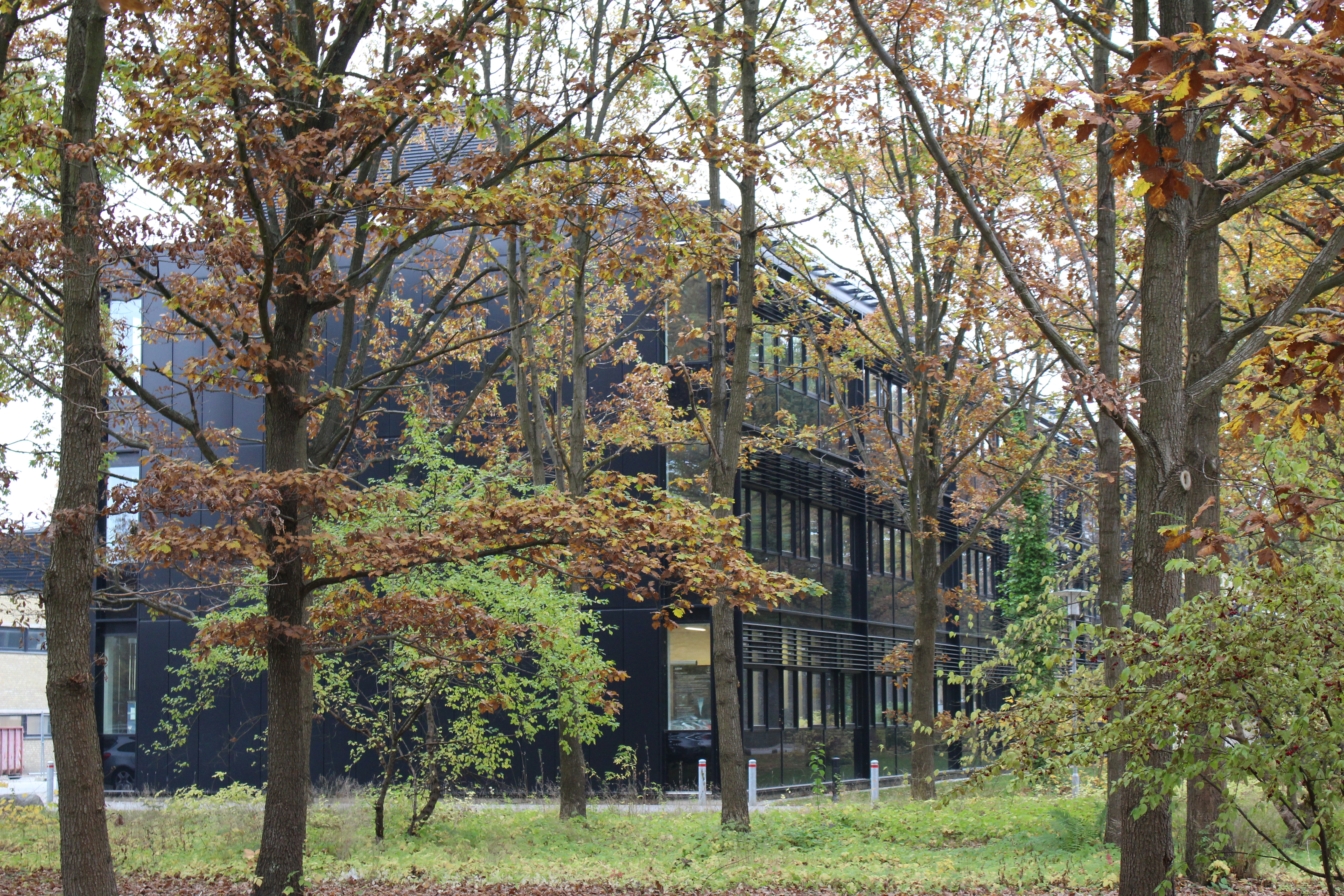 Technical University of Denmark, Building 328, DTU Space.